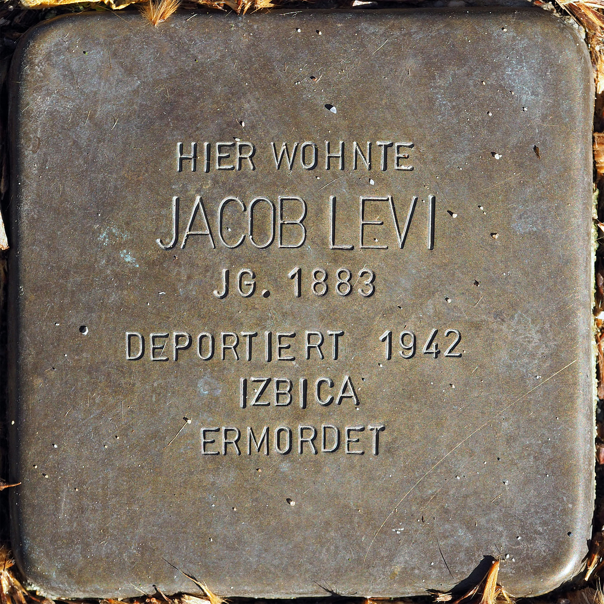 Stolpersteine MG: Levi, Jacob